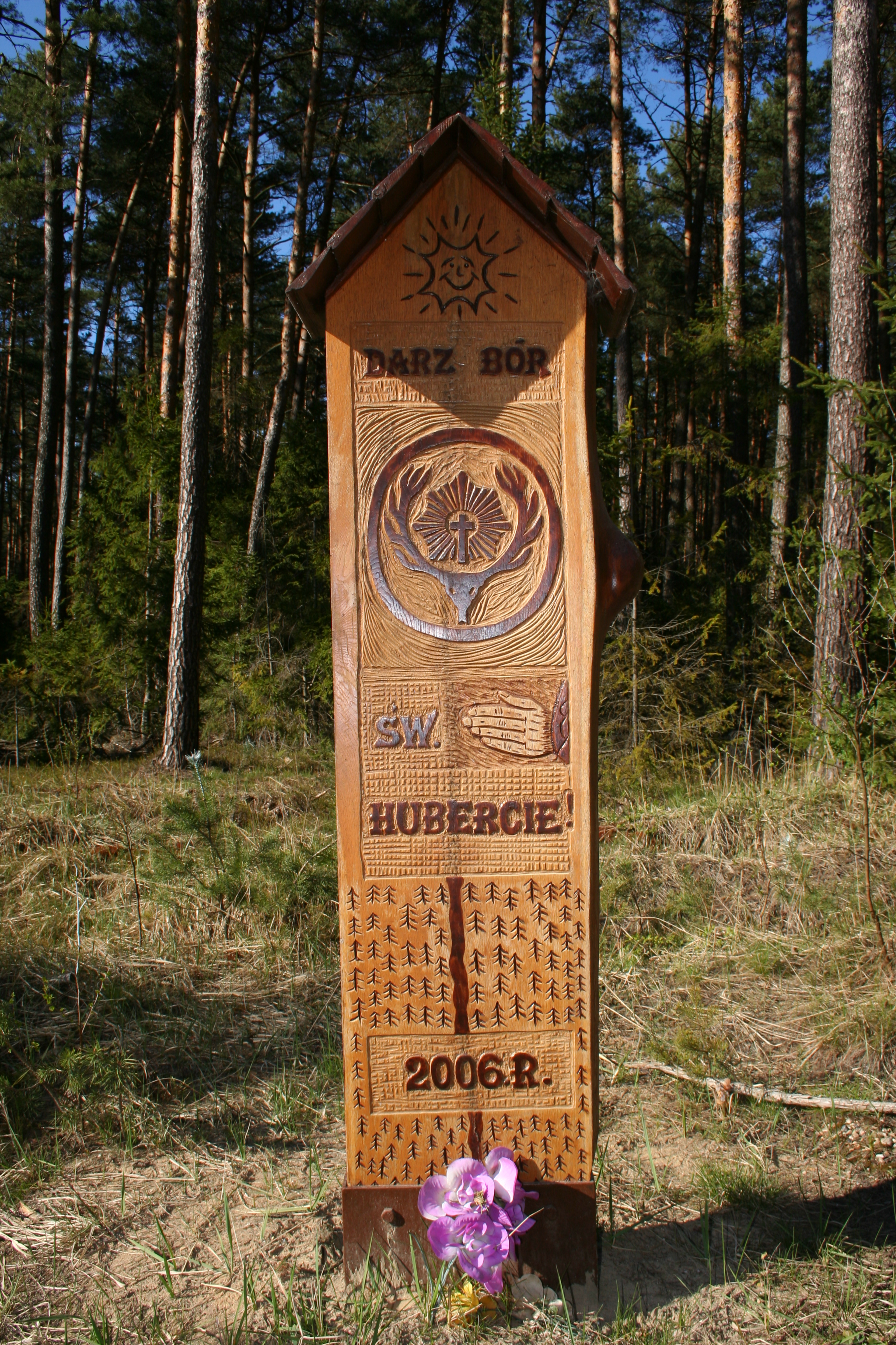 kapliczka św. Huberta w miejscowości Piłka, gmina Koszęcin, powiat lubliniecki, województwo śląskie